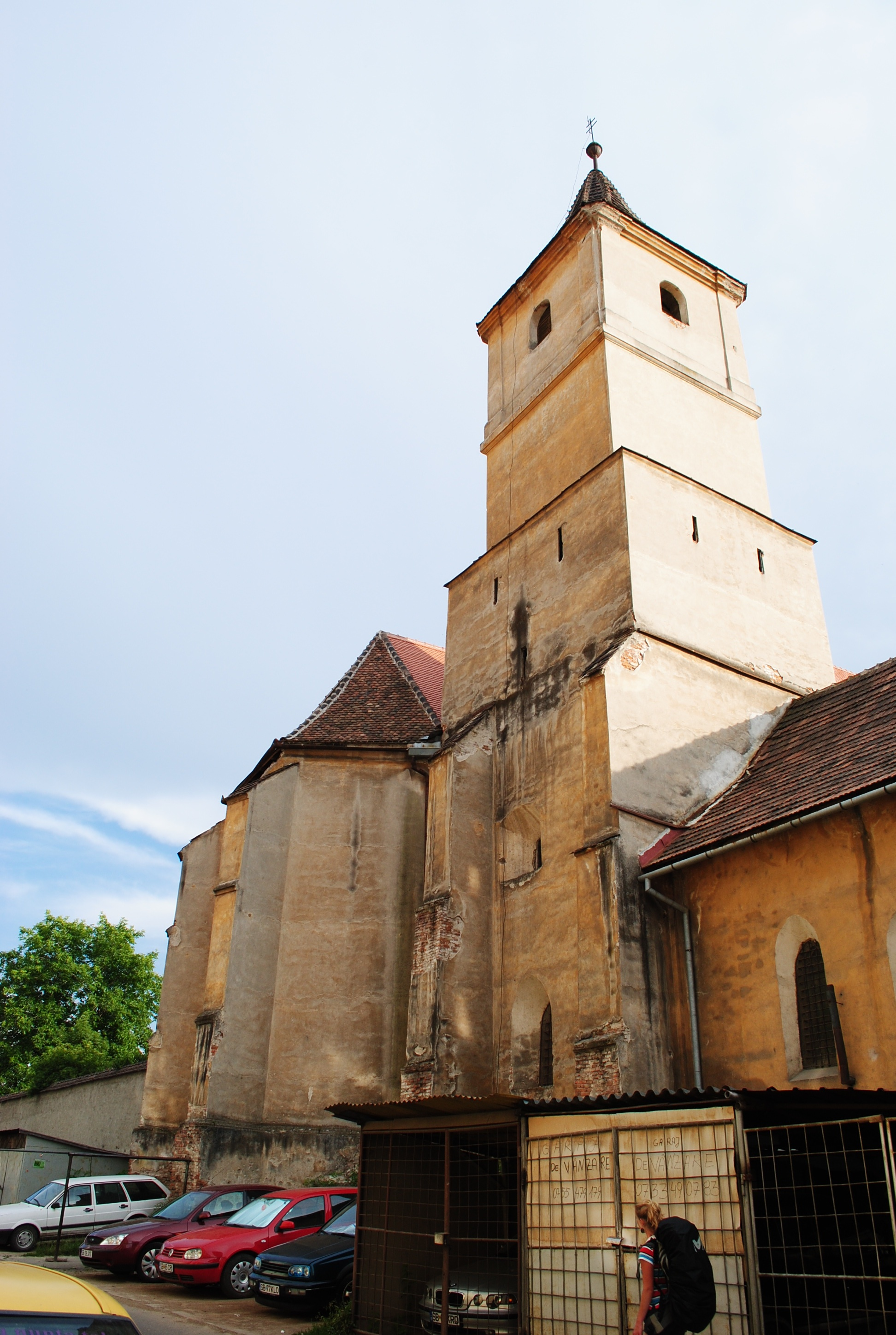 Biserica romano-catolică "Imaculata Concepțiune" 1490-1515, 1742 01